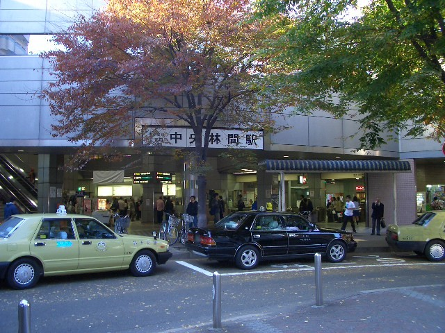 中央林間駅東急線正面口。